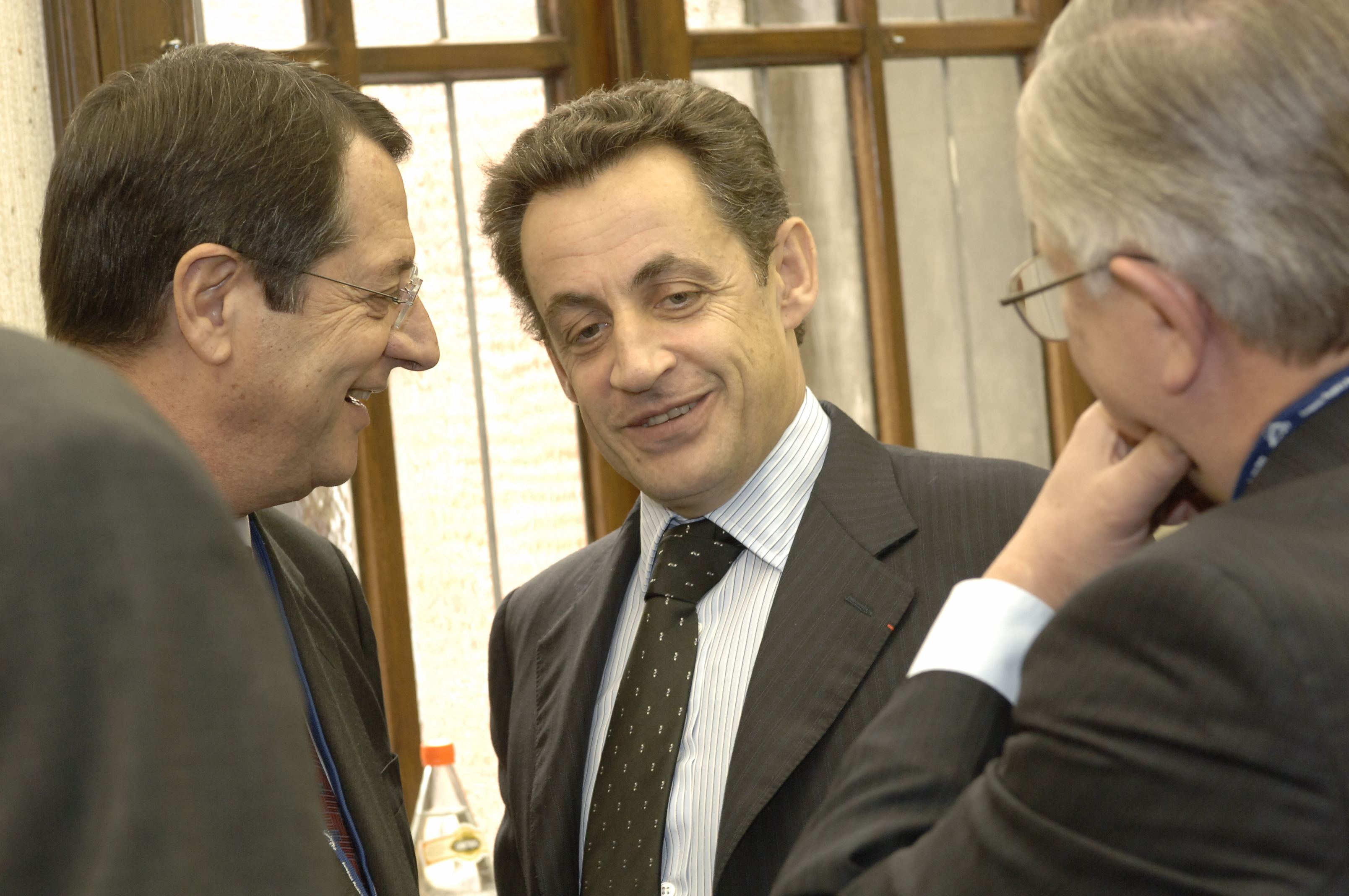 EPP Summit 14 December 2006